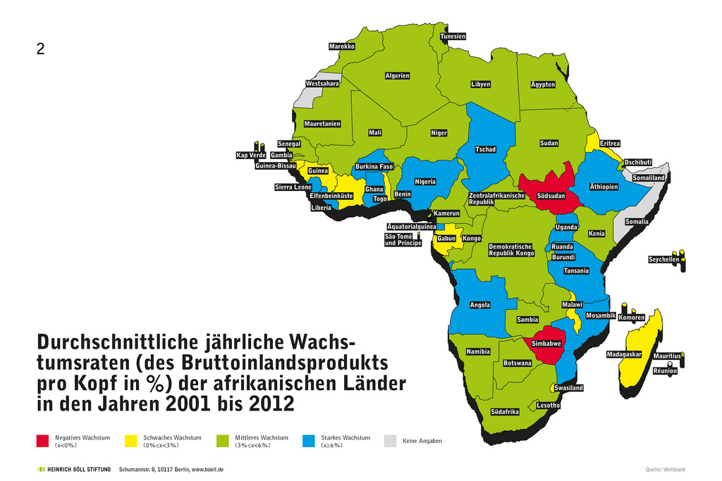 "Durchschnittliche jährliche Wachstumsraten (des Bruttoinlandsprodukts pro Kopf in %) der afrikanischen Länder in den Jahren 2001 bis 2012" Serie: Infografiken der Heinrich Böll Stiftung zu Afrikas Wirtschaften vom 25. Feb. 2014